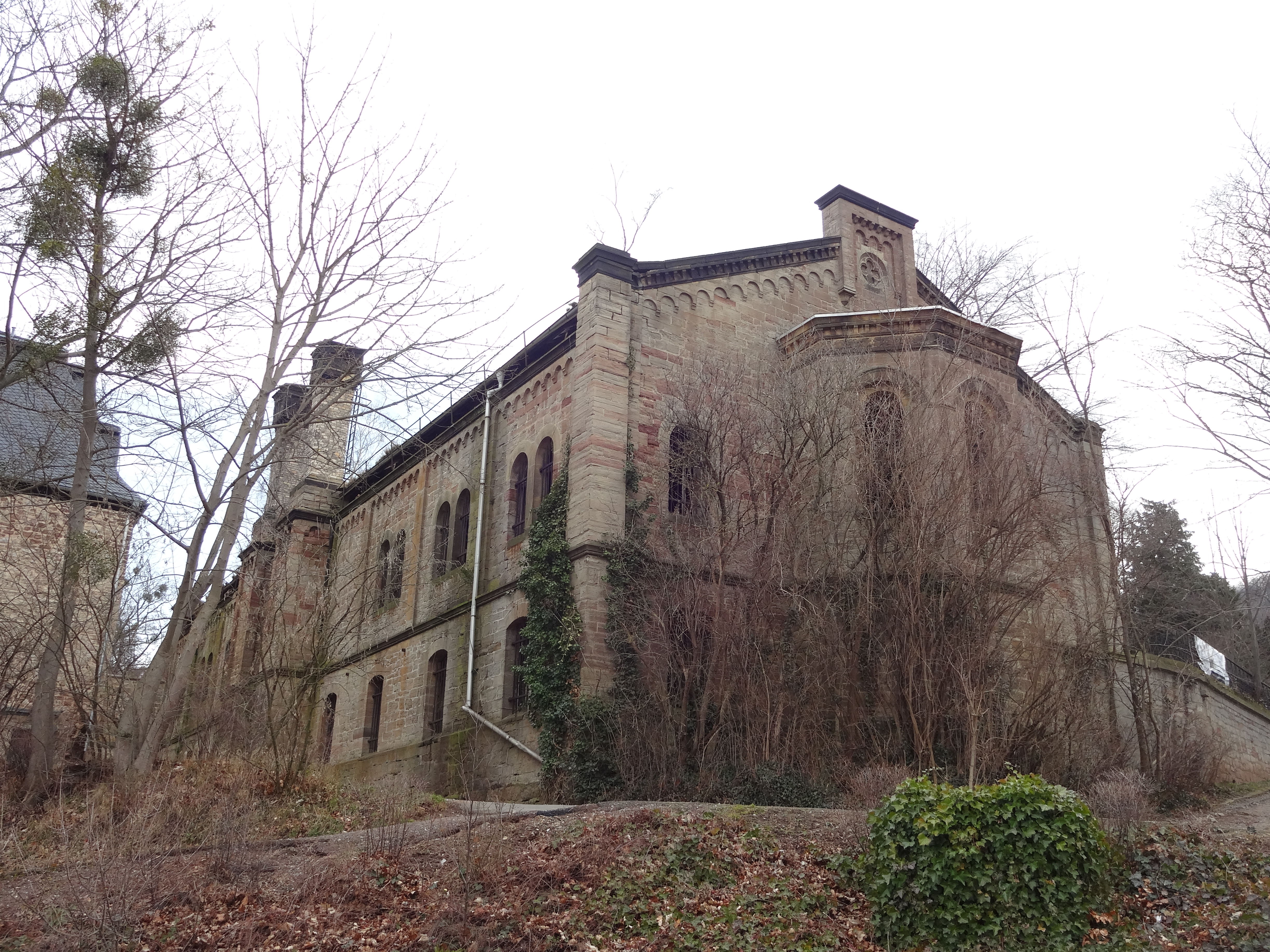 denkmalgeschütztes Palmenhaus in der Lindenallee in Wernigerode